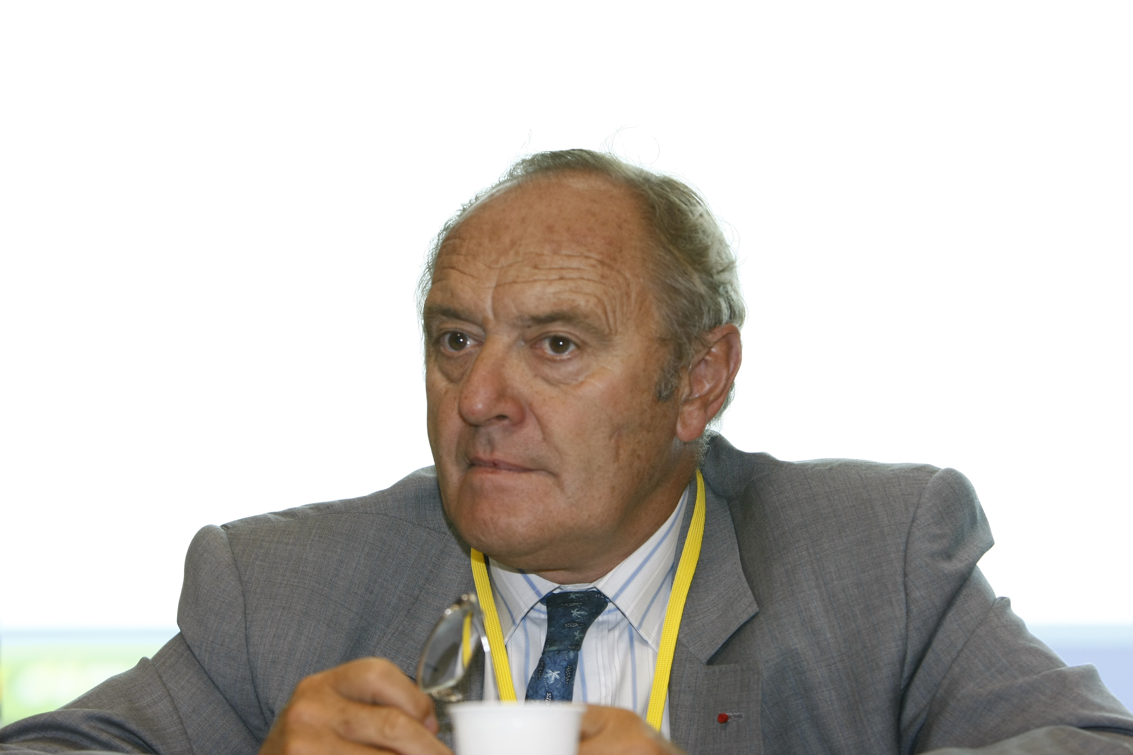 Yves-Thibault de Silguy, homme d'affaires français